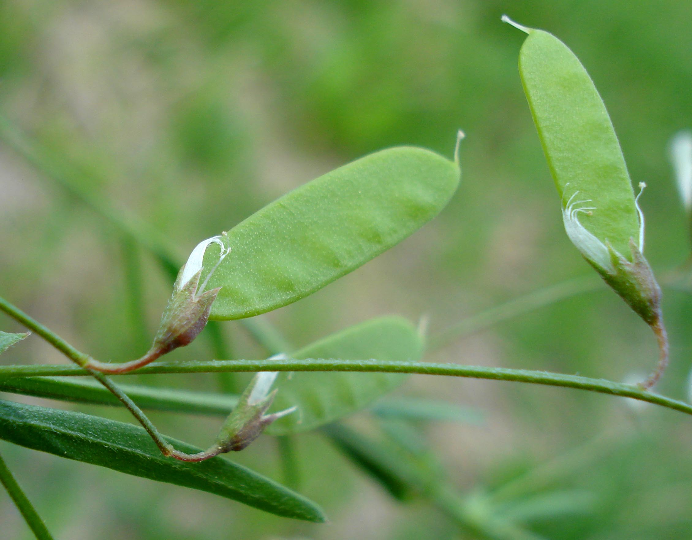 Vicia tetrasperma (Unterfranken, Germany)